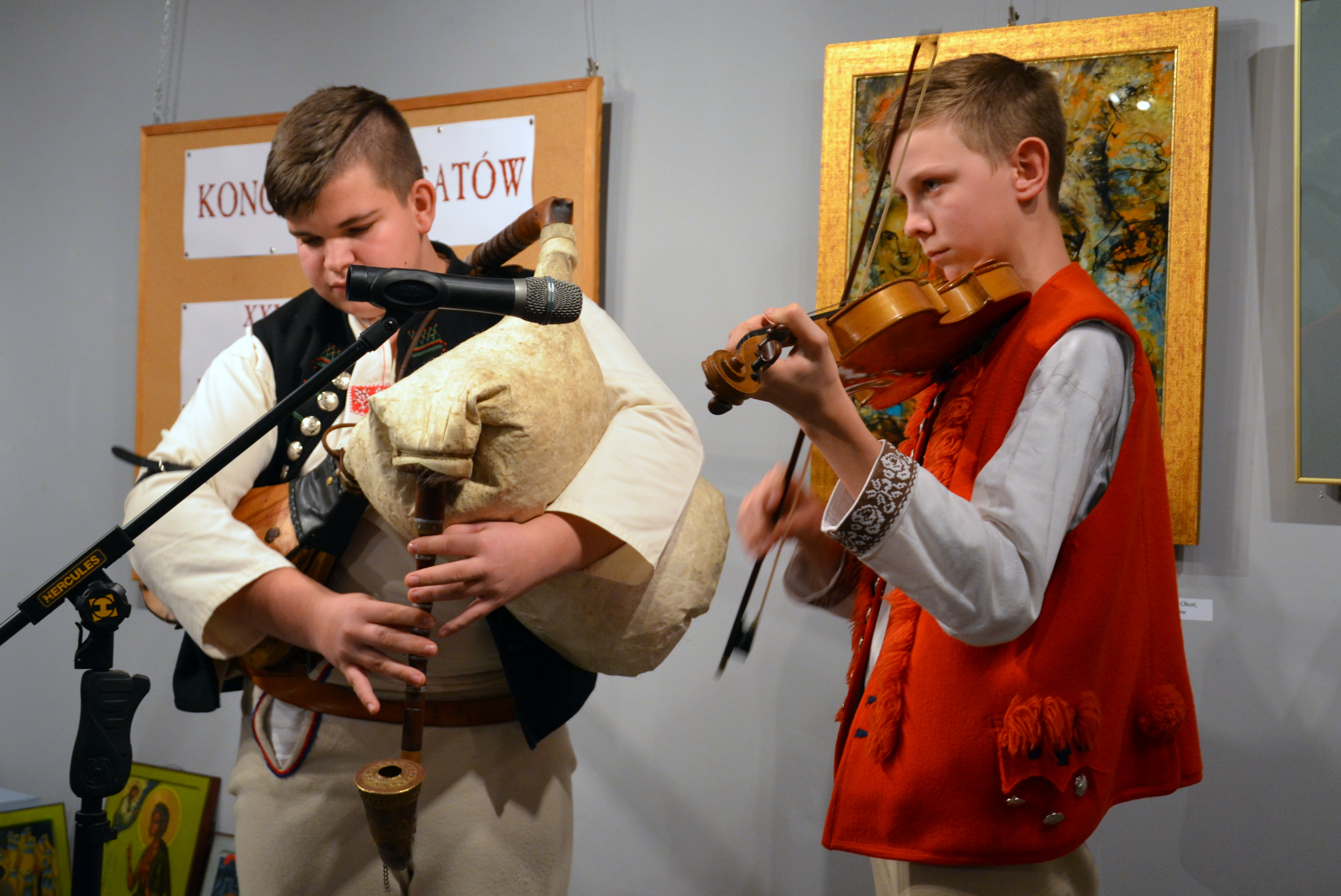 Beskidischer Oberländer